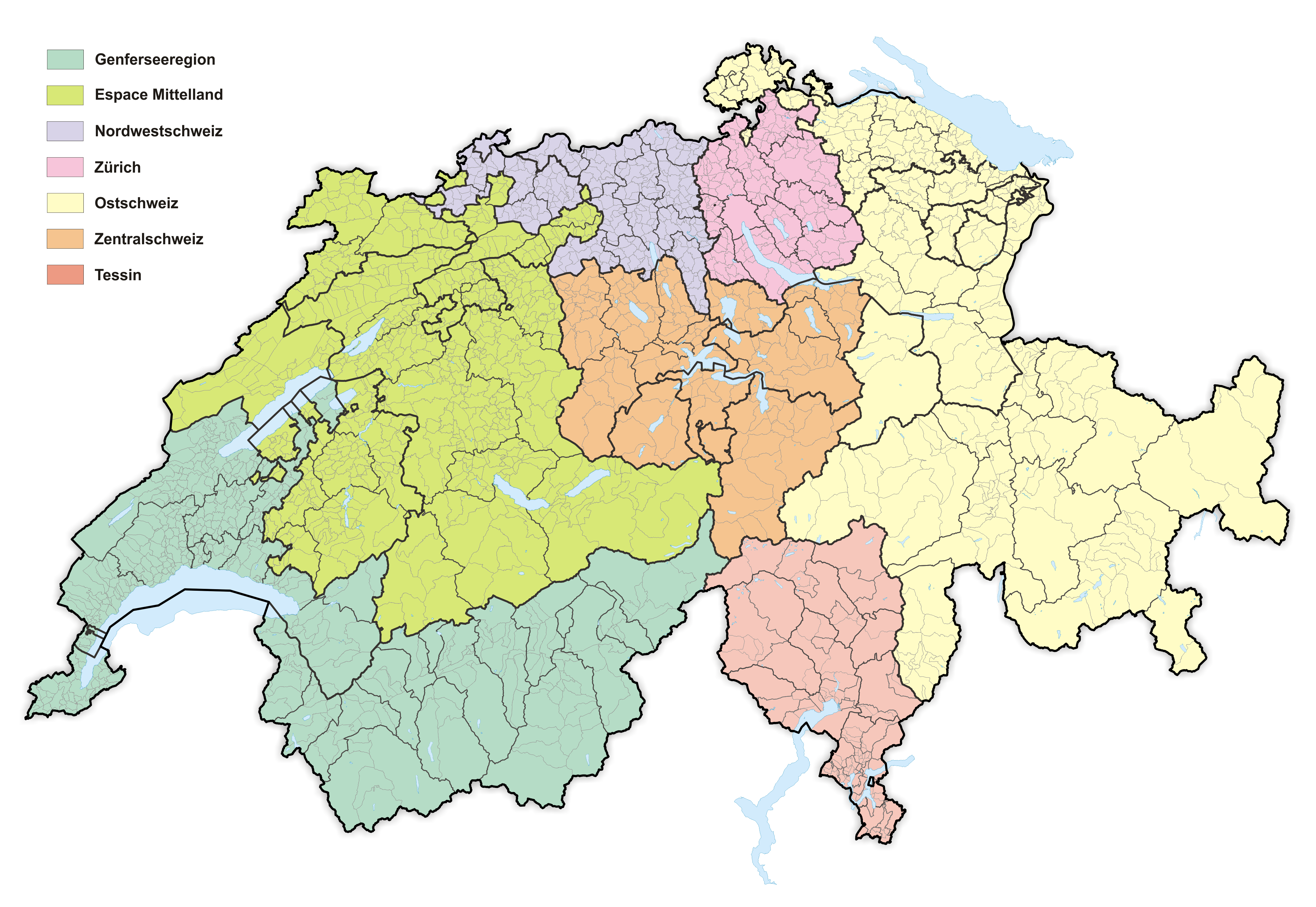 Grossregionen der Schweiz